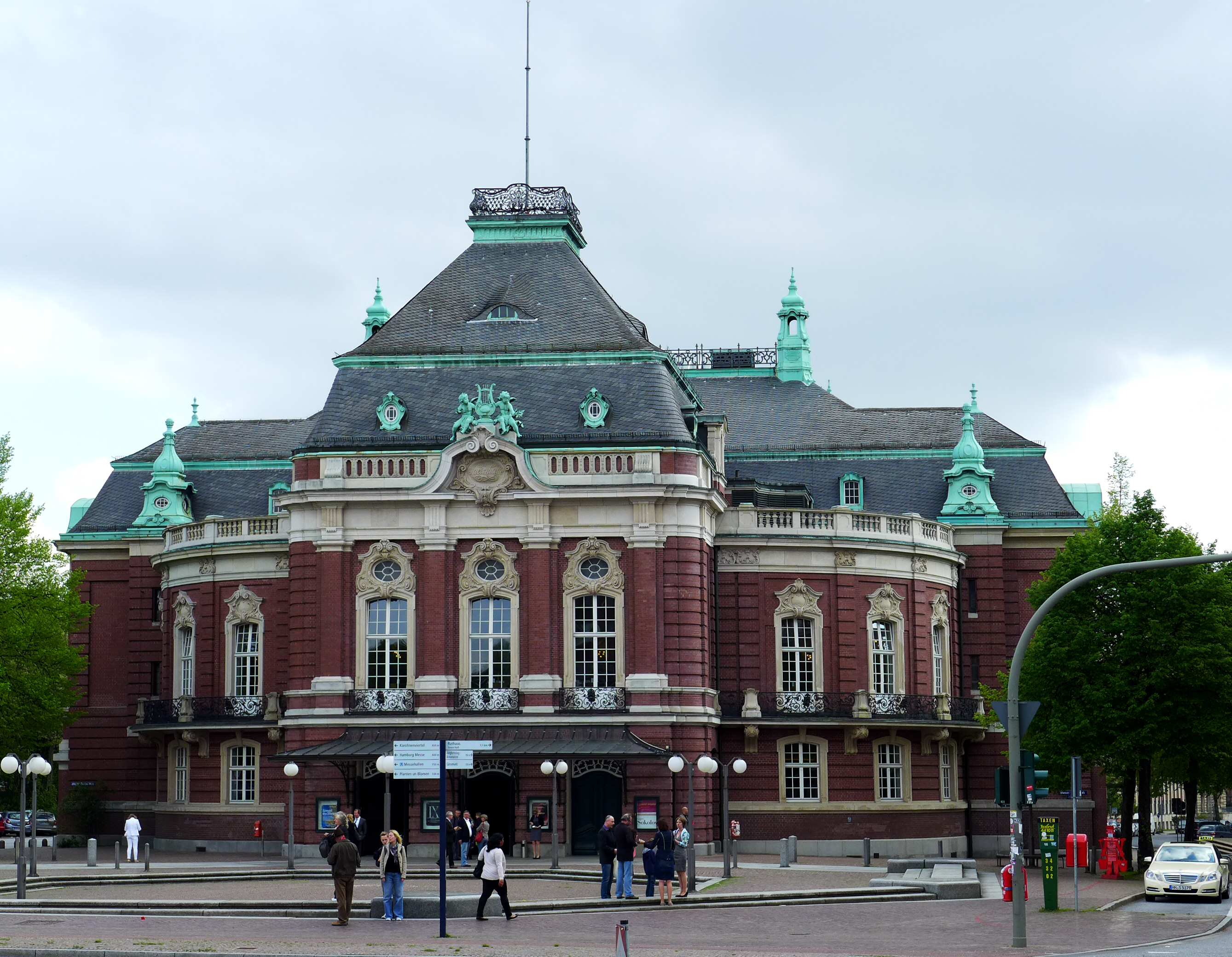 Laeiszhalle, ein im Jahre 1908 eröffnetes Konzerthaus im neobarocken Baustil in Hamburg-Neustadt am Johannes-Brahms-Platz. Den Hamburgern sind die vorherigen und langandauernden Namensgebungen "Musikhalle" und "Karl-Muck-Platz" besser bekannt und im Gedächtsnis. Foto vom Mai 2013.